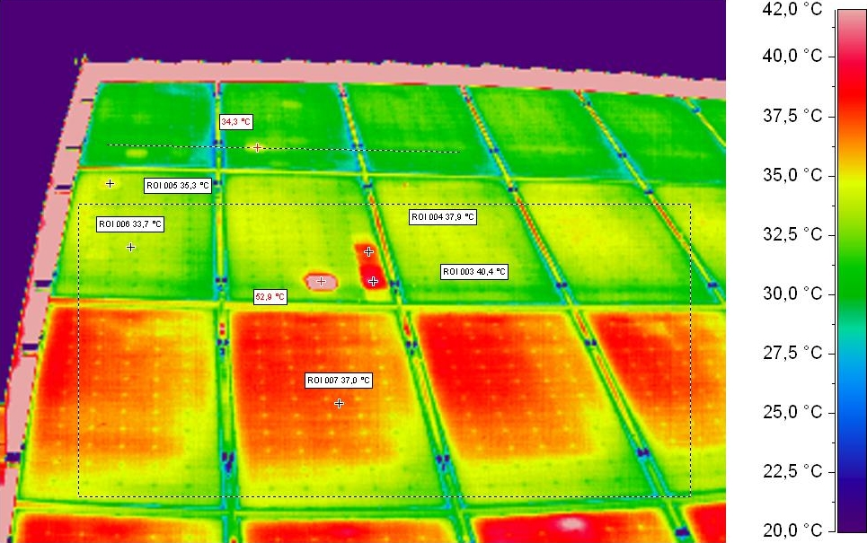 Thermografie an einer Photovoltaik - Anlage / fehlerhafte Zelle